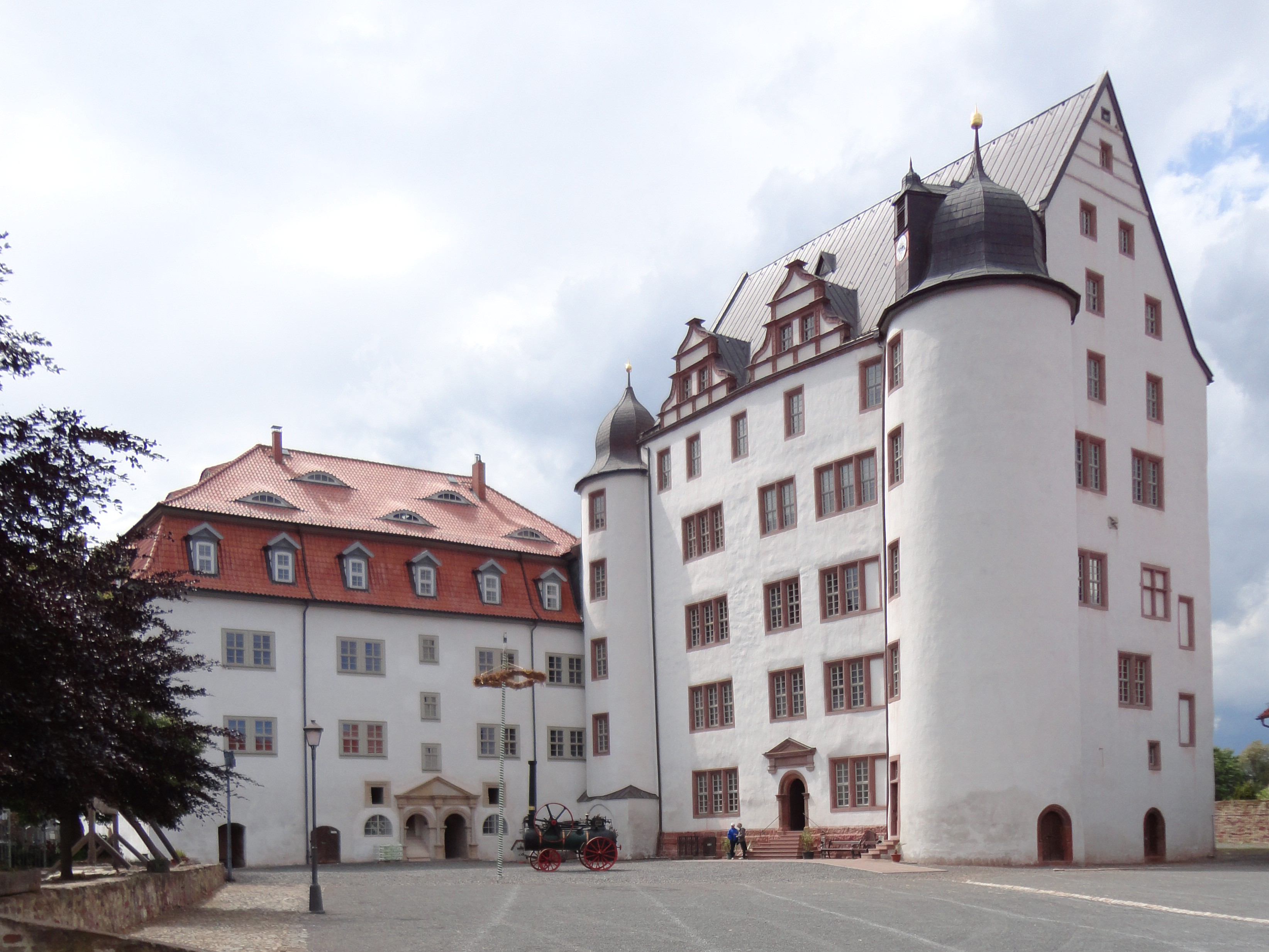 Das renovierte Schloss in Heringen an der Helme.